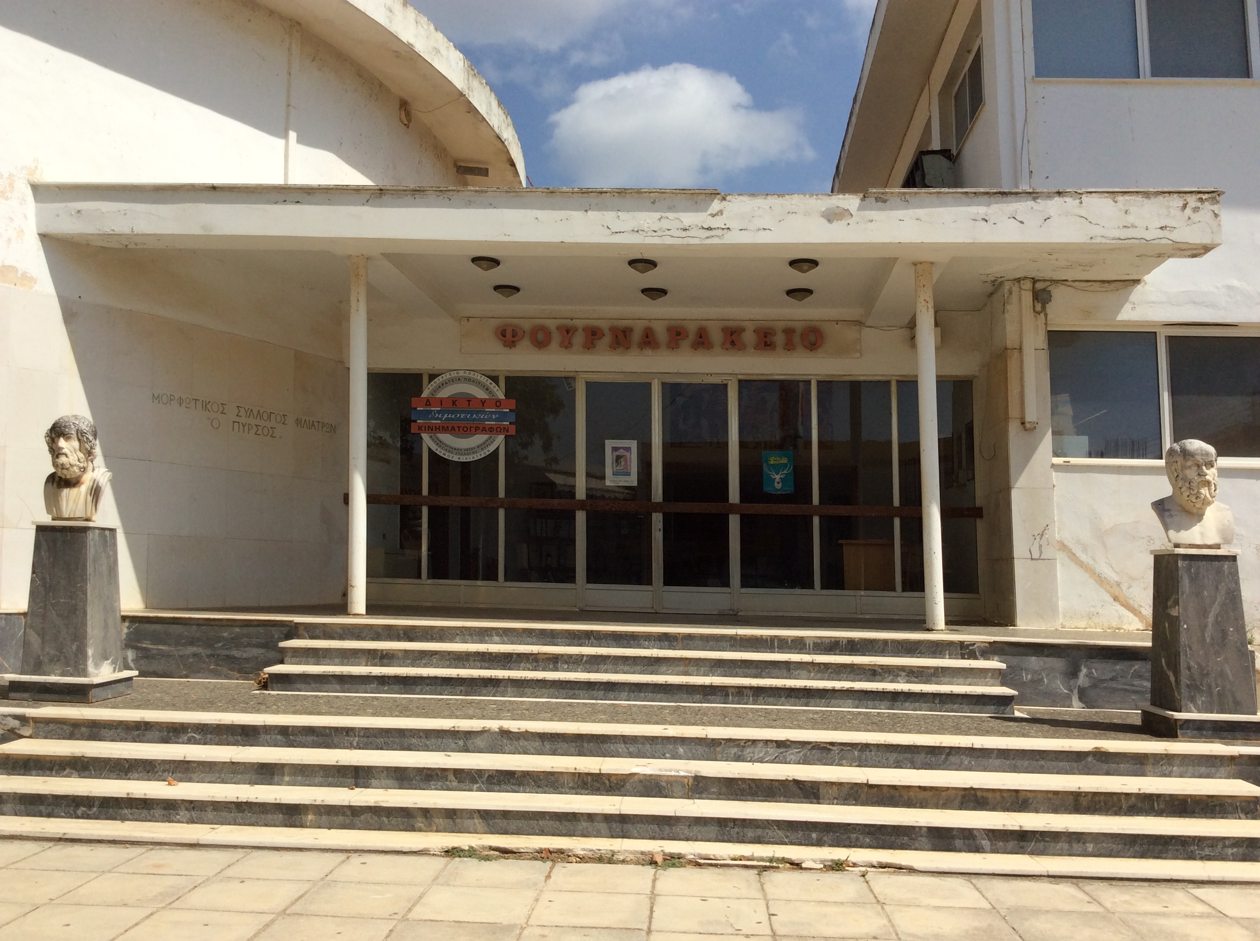 Φιλιατρά Μεσσηνίας. Το κτίριο που στεγάζει το "Φουρναράκειο Πνευματικό Κέντρο".